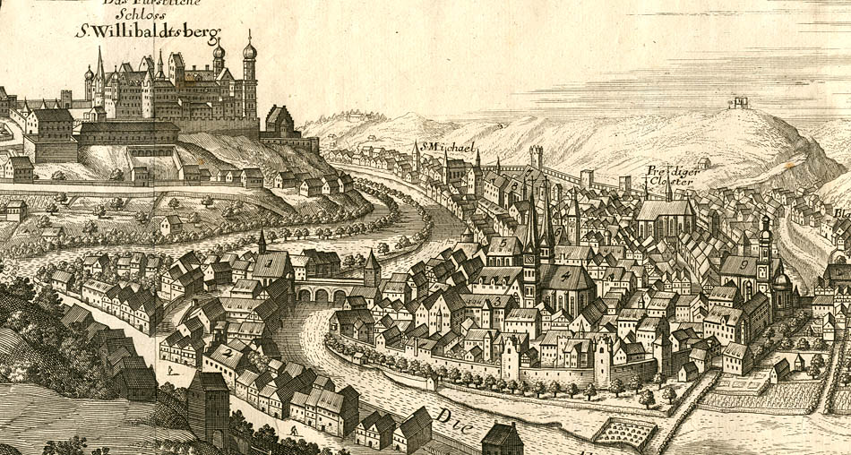 “Aichstaedt”, Kupferstich bei Gabriel Bodenehr, Augsburg um 1720